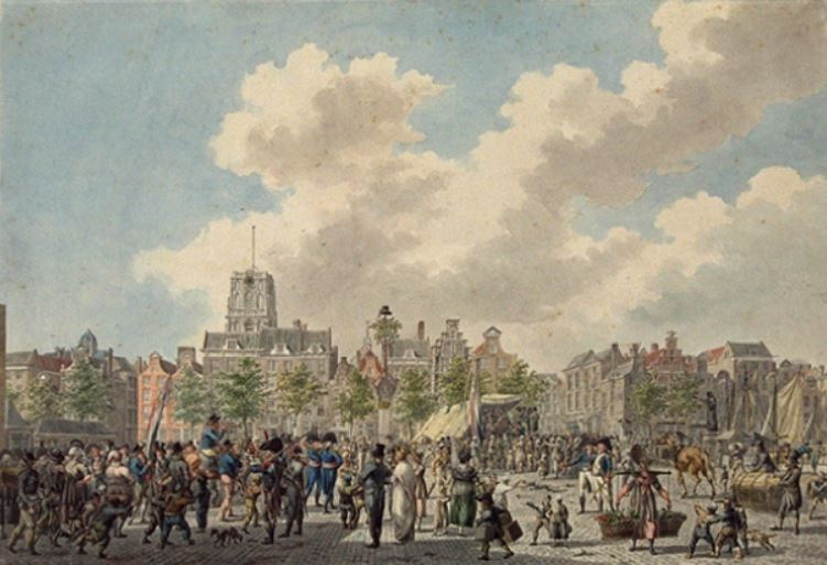 Huile représentant une place de Rotterdam sous la République batave en 1798. Œuvre de Jan Antonie Langendijk.